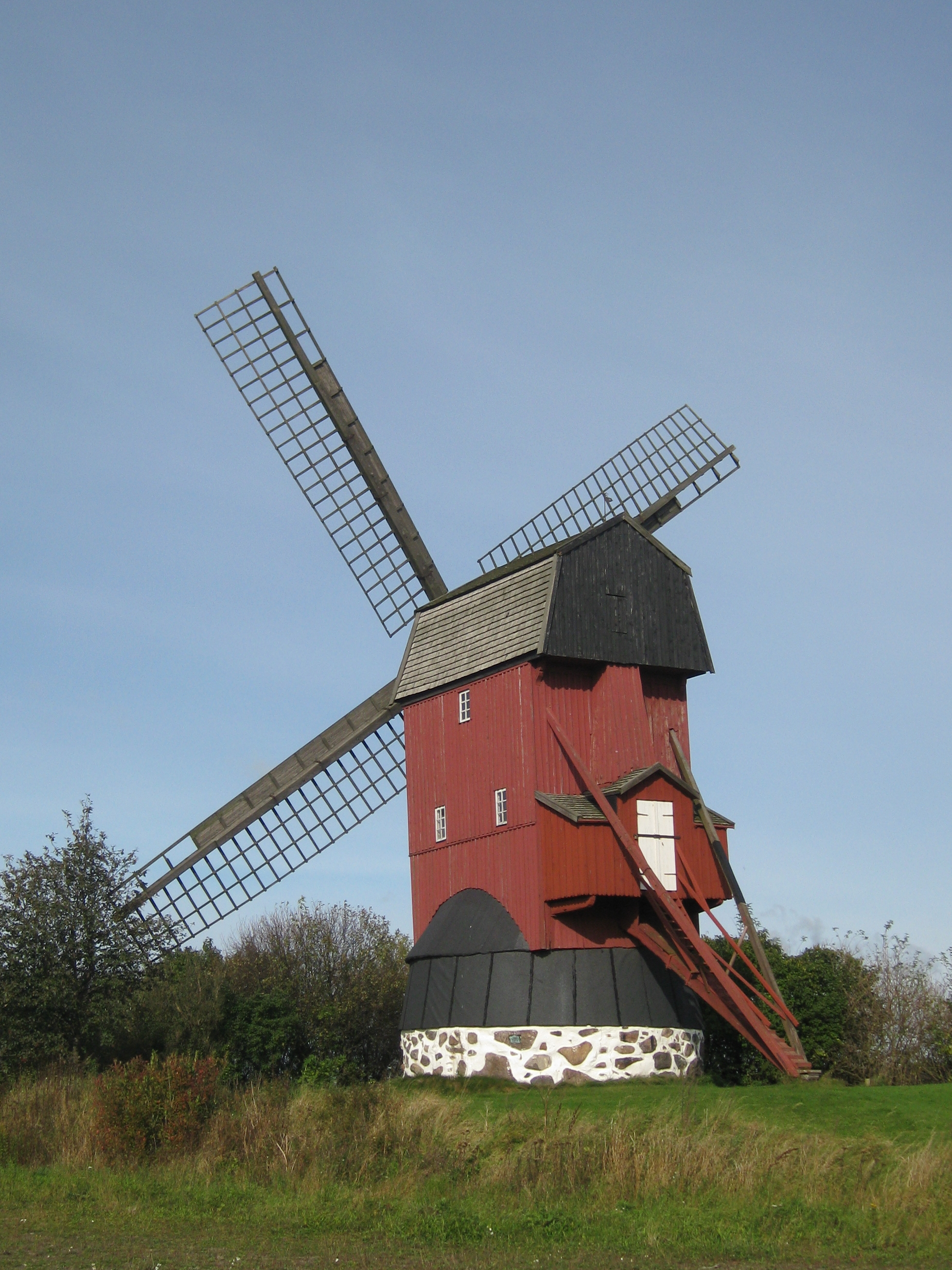 Häljarps mölla, byggnadsminnesförklarad väderkvarn.